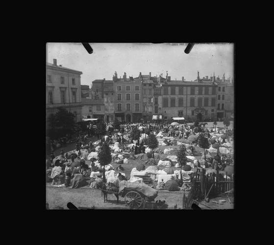 Place du Salin. 24 août 1899. Vue d'ensemble plongeante de la Foire à l'ail. Au premier plan étalages de bulbes d'ail, marchands, parasols, en arrière plan façade du côté ouest de la place.